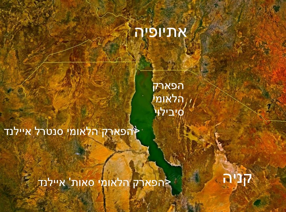 Satellitenbild des Turkana-Sees auf den Staatsgebieten von Kenia und Äthiopien mit hebräischer Beschriftung. Die Staatsgrenzen sind als gelbe Linien eingezeichnet. parchi naziunali Turkana